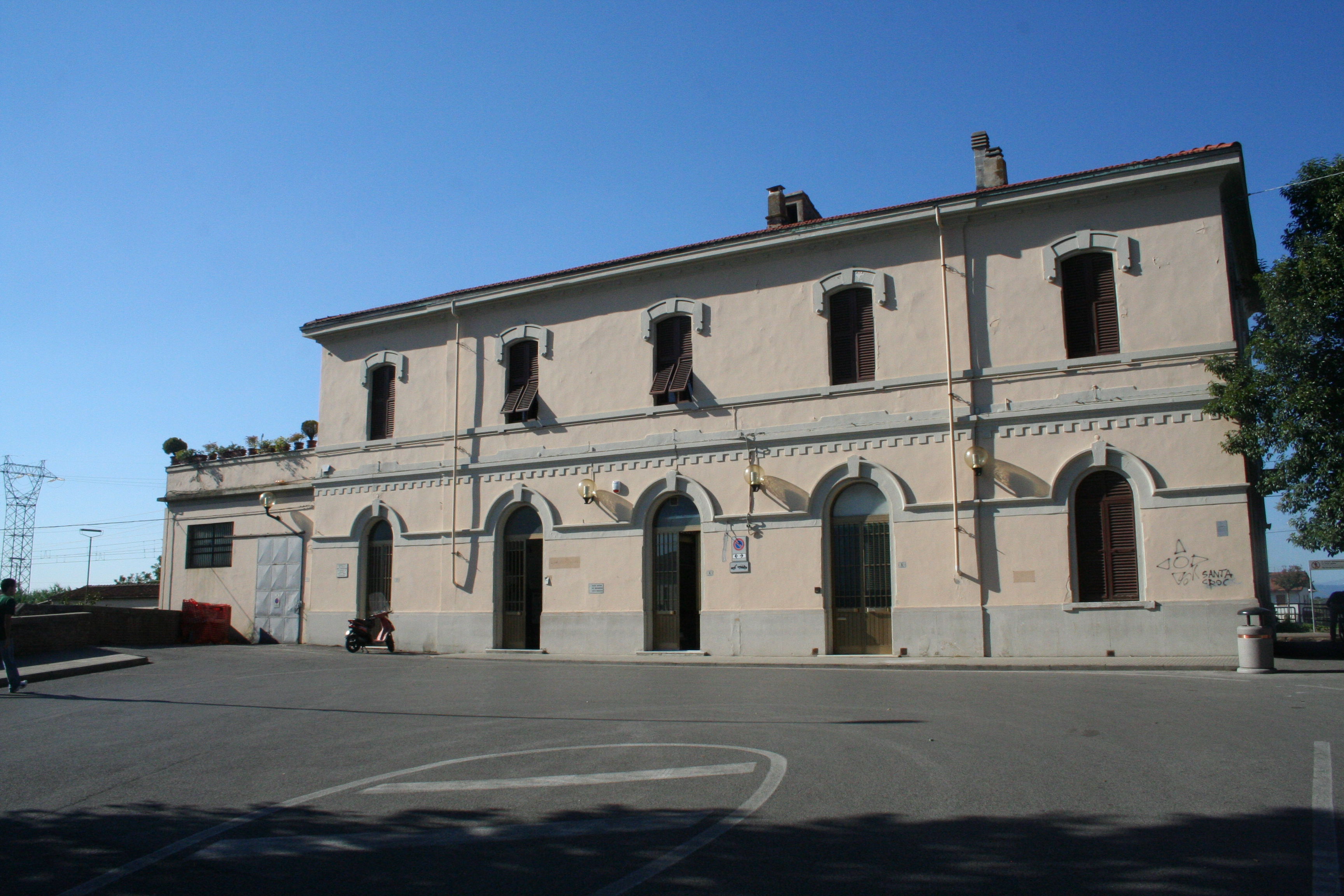 Lato campagna del fabbricato viaggiatori della stazione di San Miniato-Fucecchio